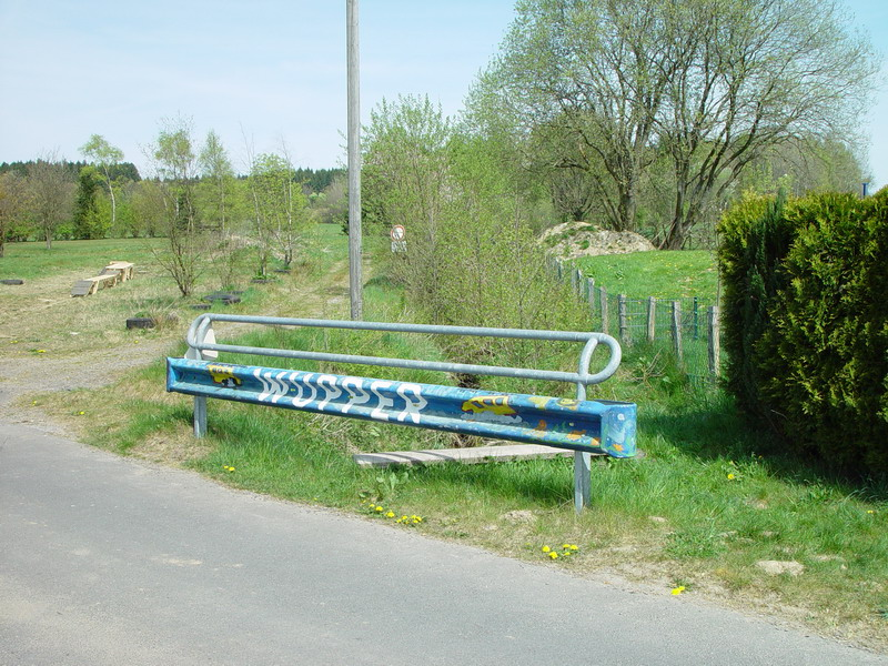 Nördliche Wupperbrücke der Straße Zur Wupperquelle in Marienheide-Börlinghausen